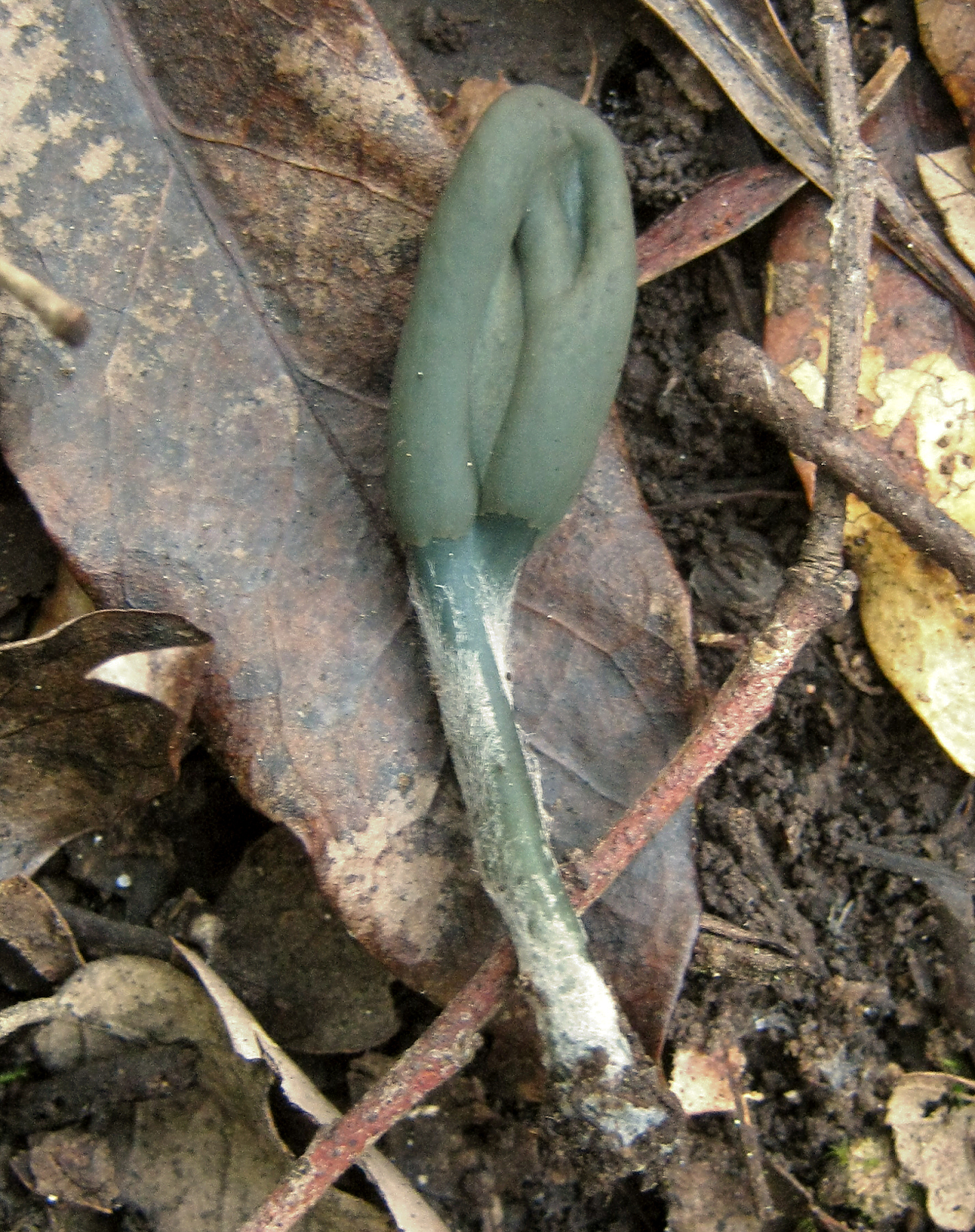 Microglossum olivaceum (Pers.) Gillet